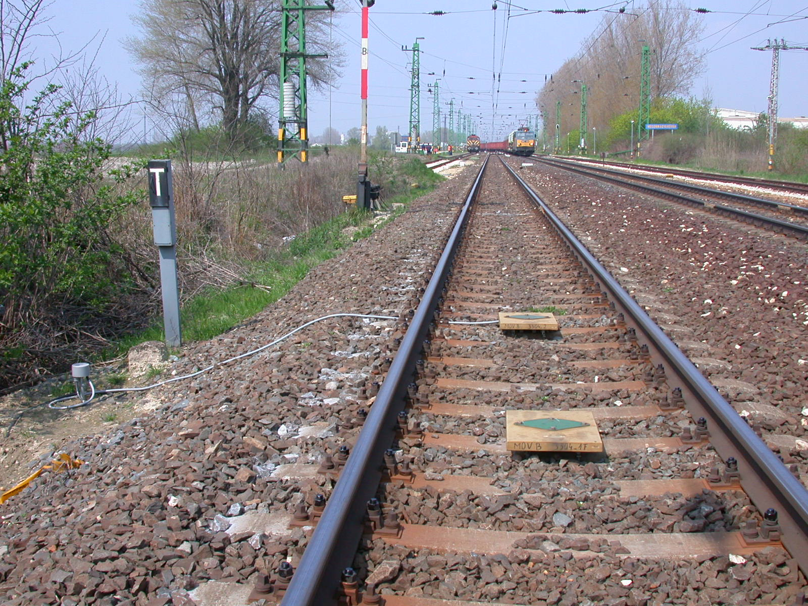 Balizok Mosonmagyaróváron